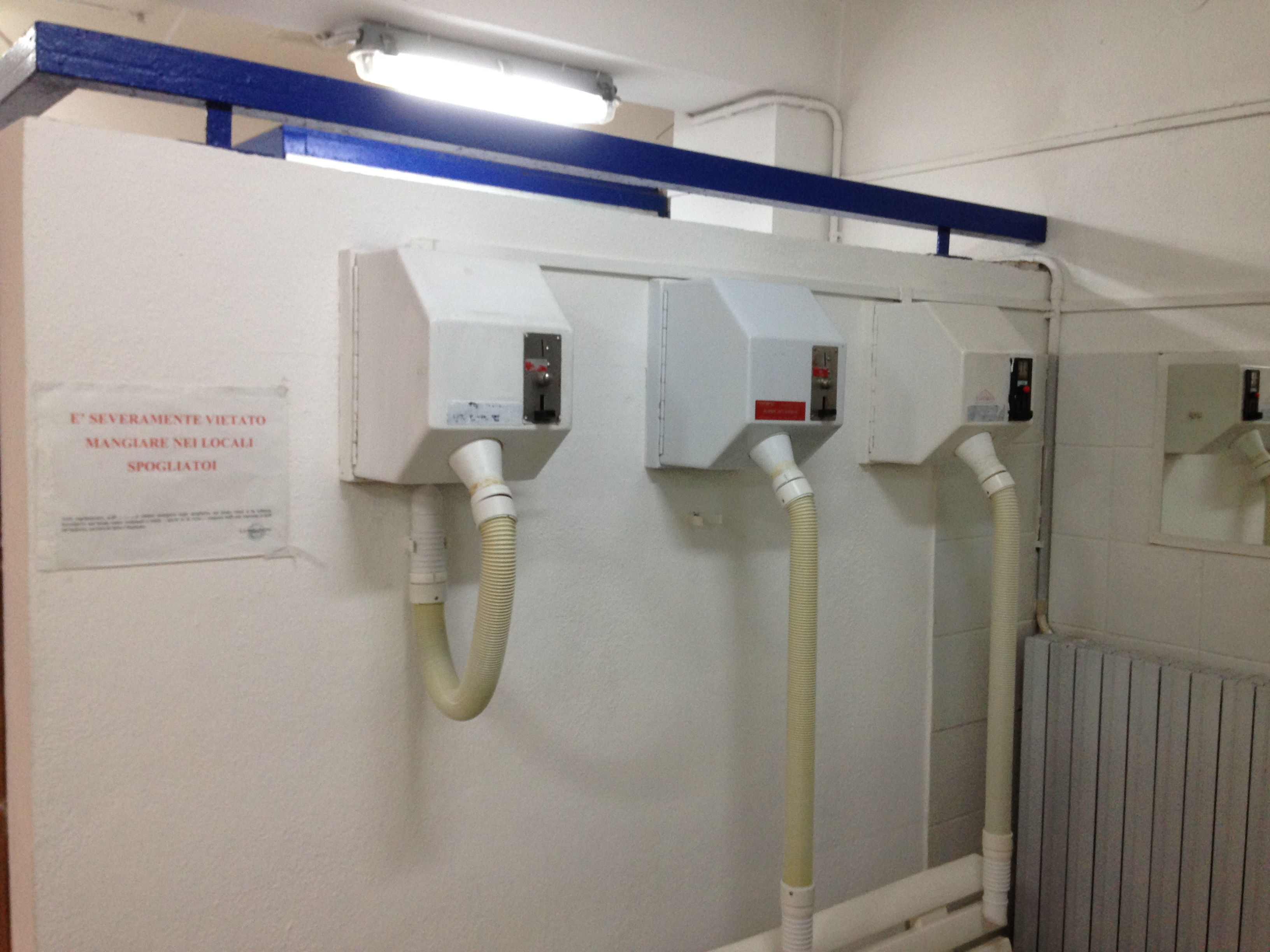 Tre dei sette asciugacapelli a parete con tubo funzionanti a gettone presenti nello spogliatoio maschile di una piscina di Nuoro. Si attivano inserendo una moneta da € 0,20